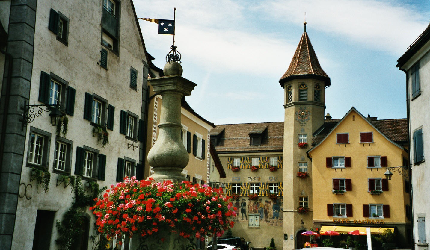 Ortskern von Maienfeld GR